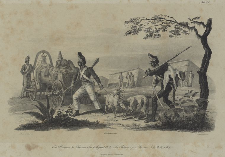 Беларуская (тарашкевіца): Бівак каля Лёзна (Lozna)